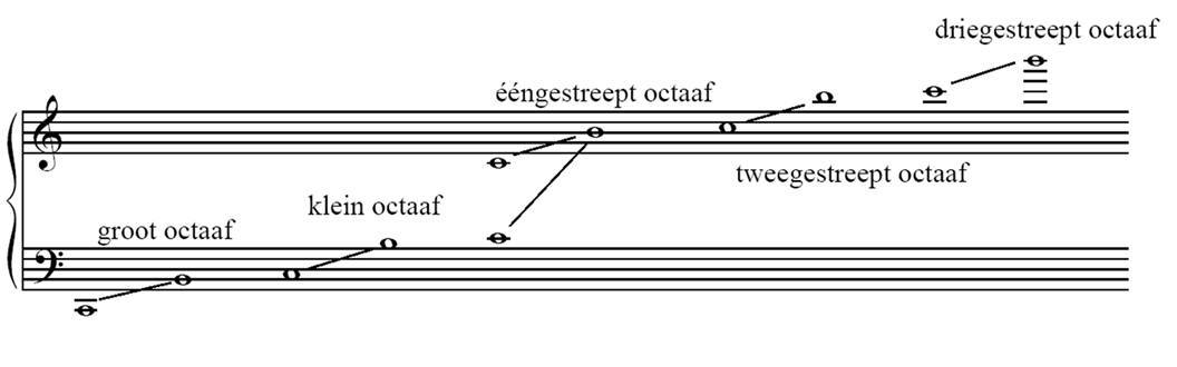 benamingen van de octaafintervallen